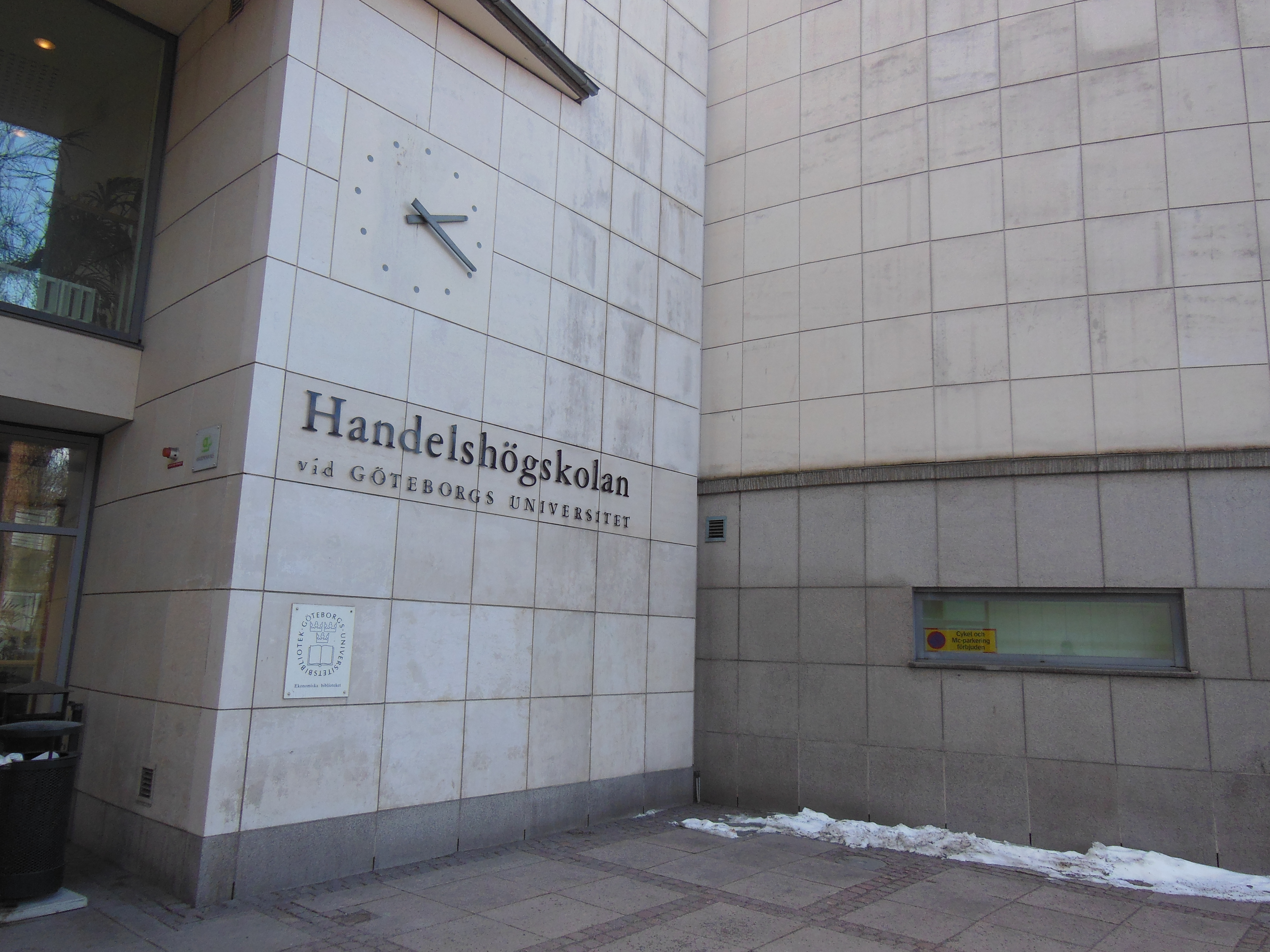 Skylt vid entrén till Handelshögskolan, Göteborg mars 2013.